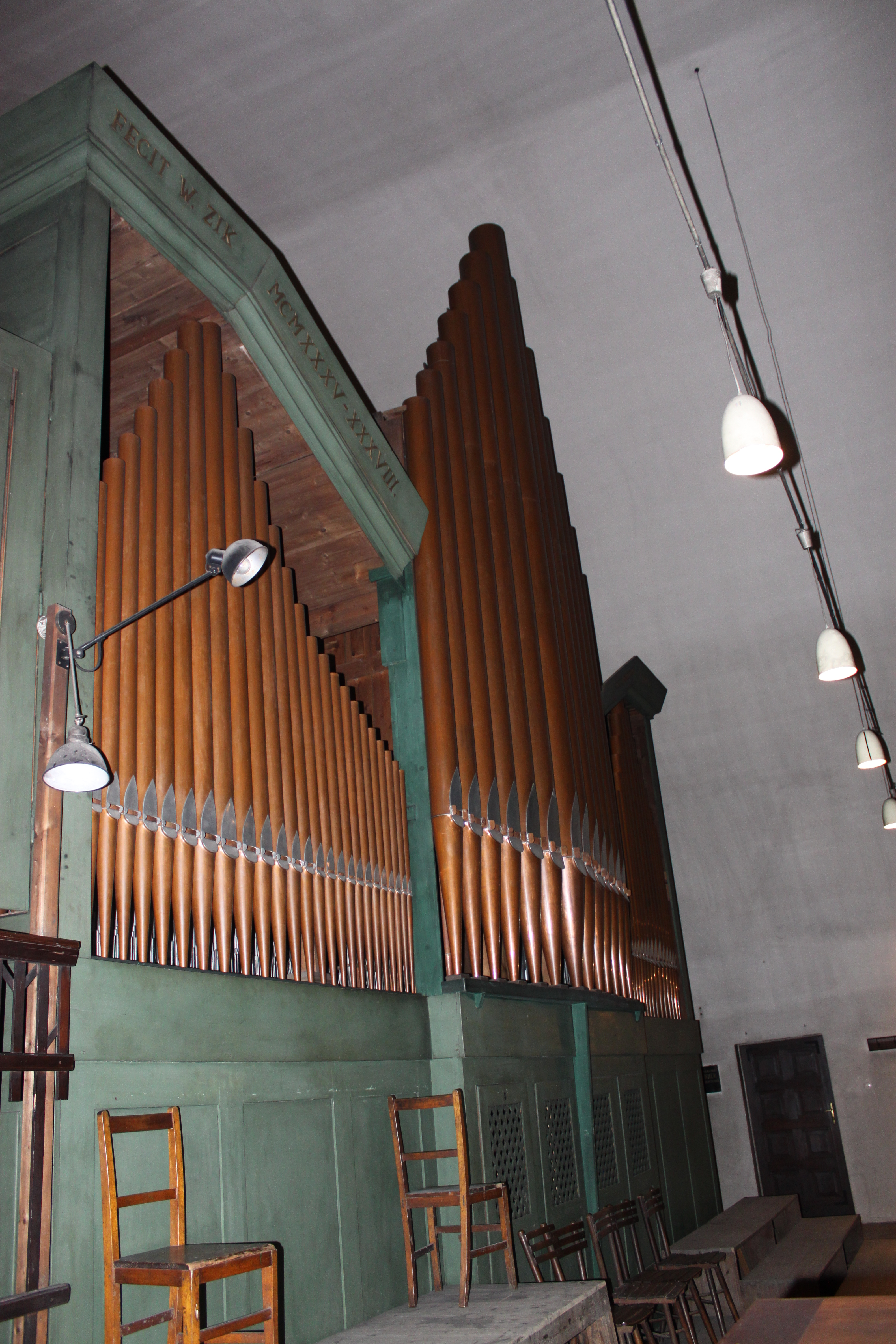 Hauptgehäuse der Orgel der Pfarrkirche Alt-Ottakring, errichtet 1935-1938 von Josef Mertin und Wilhelm Zika